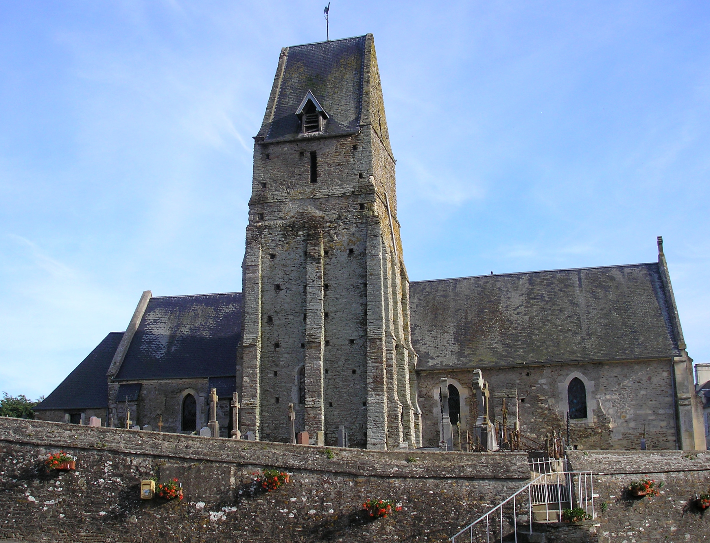 Tracy-Bocage (Normandie, France). L'église Saint-Raven-et-Saint-Rasiphe.